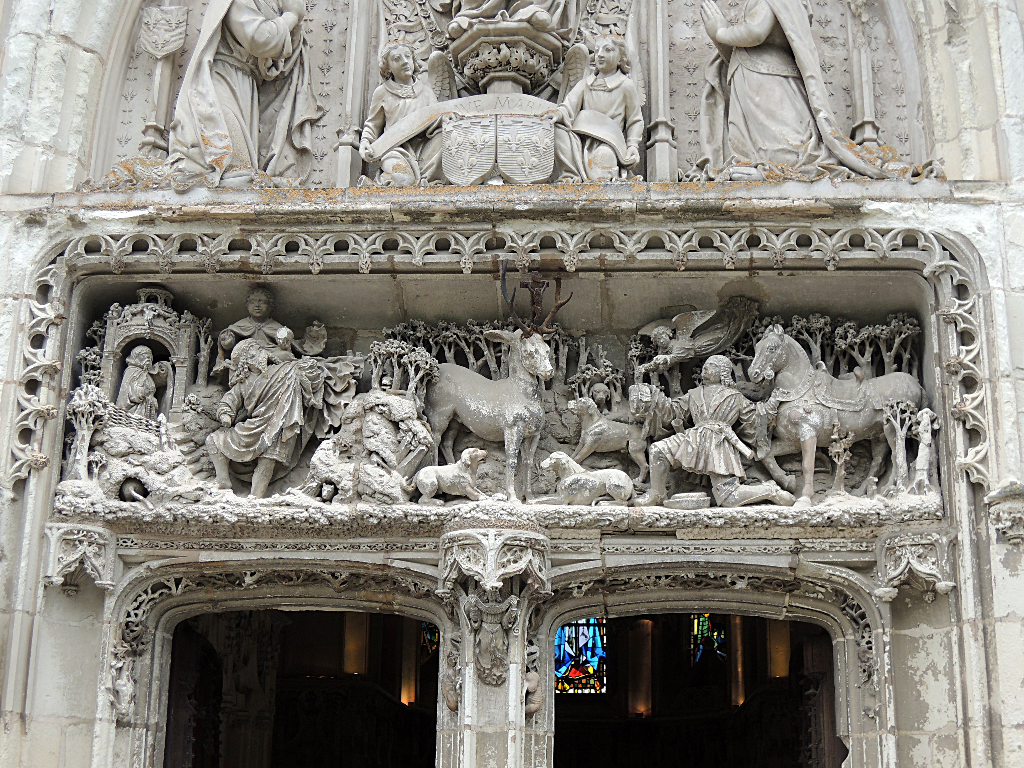 Fronton de la chapelle Saint-Hubert au château d'Amboise.